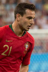 Гол на 93-й минуте и незабитый пенальти Роналду. Иран попортил нервы португальцам